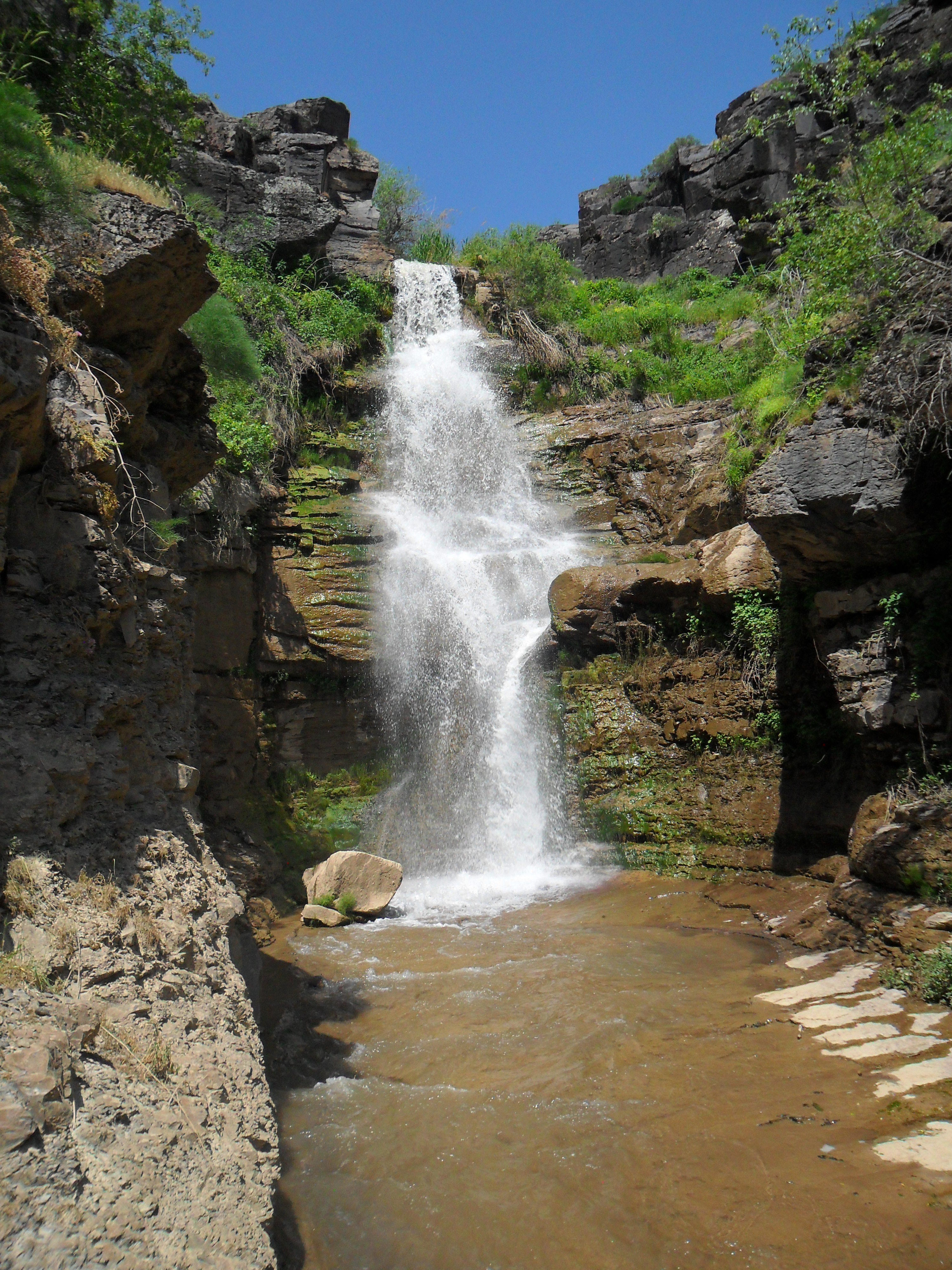 Водопад на реке Таваксай. Бостанлыкский район, Ташкентская область, Республика Узбекистан